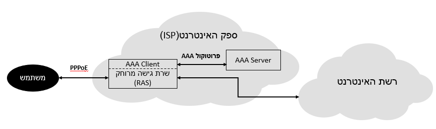 בקרת גישה לאינטרנט באמצעות שרת AAA